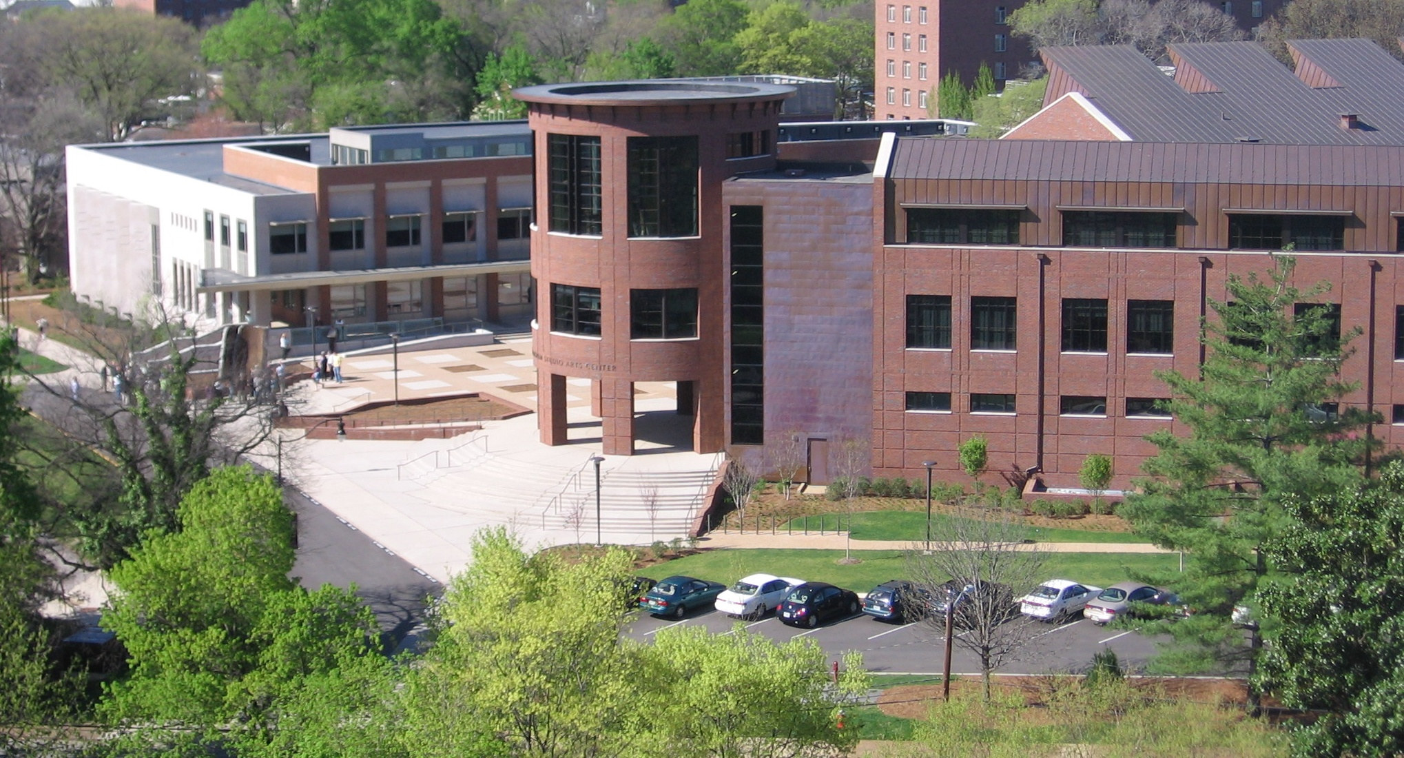 Vanderbilt Ingram Studio Art Center